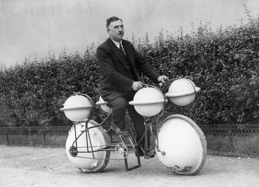 Nationaal Archief / Spaarnestad Photo / Fotograaf onbekend, SFA002005344. De Cyclomer, een fiets die op land en op water kan rijden met een belasting van maximaal 120 kilo. Parijs, 1932. Amphibious bike 'Cyclomer'. Paris, 1932. Collectie Spaarnestad Voor meer informatie en voor meer foto’s uit de collectie van Spaarnestad Photo, bezoek onze Beeldbank: U kunt ons helpen onze kennis van de fotocollecties te verrijken door tags en commentaren toe te voegen. Herkent u mensen of locaties of heeft u een bijzonder verhaal te vertellen bij één van de foto’s, laat dan een reactie achter (als u ingelogd bent bij Flickr) of stuur een mailtje naar: You can help us gain more knowledge on the content of our collection by simply adding a comment with information. If you do not wish to log in, you can write an e-mail to